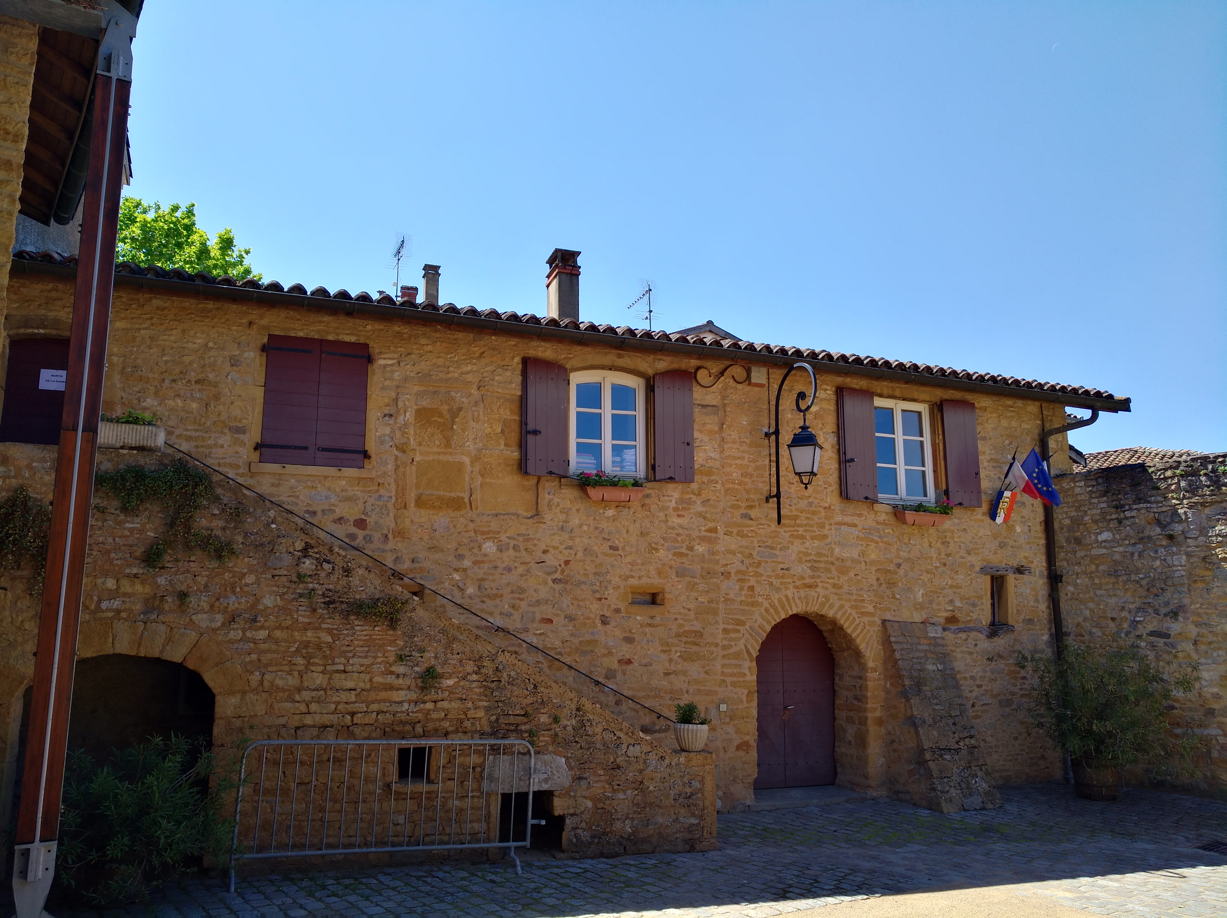 Mairie de Belmont d'Azergues (Rhône, France).